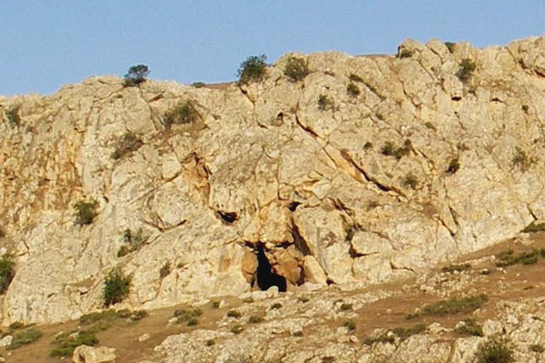 El Hajeb (Maroc) ; les falaises avec la grotte, dite "du Lion"